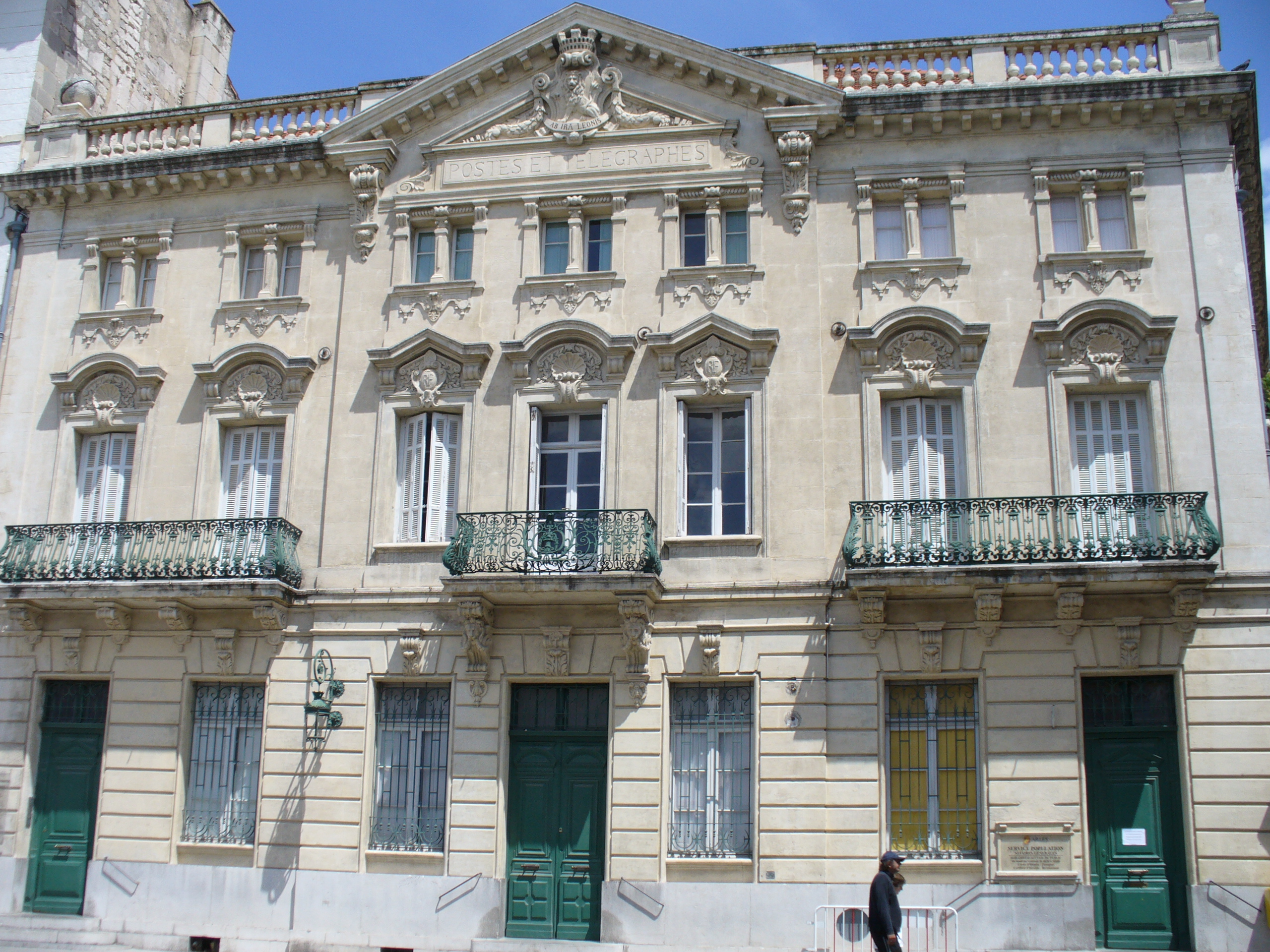 43°40′34.0″N 4°37′39.2″E / 43.67611°N 4.627556°E